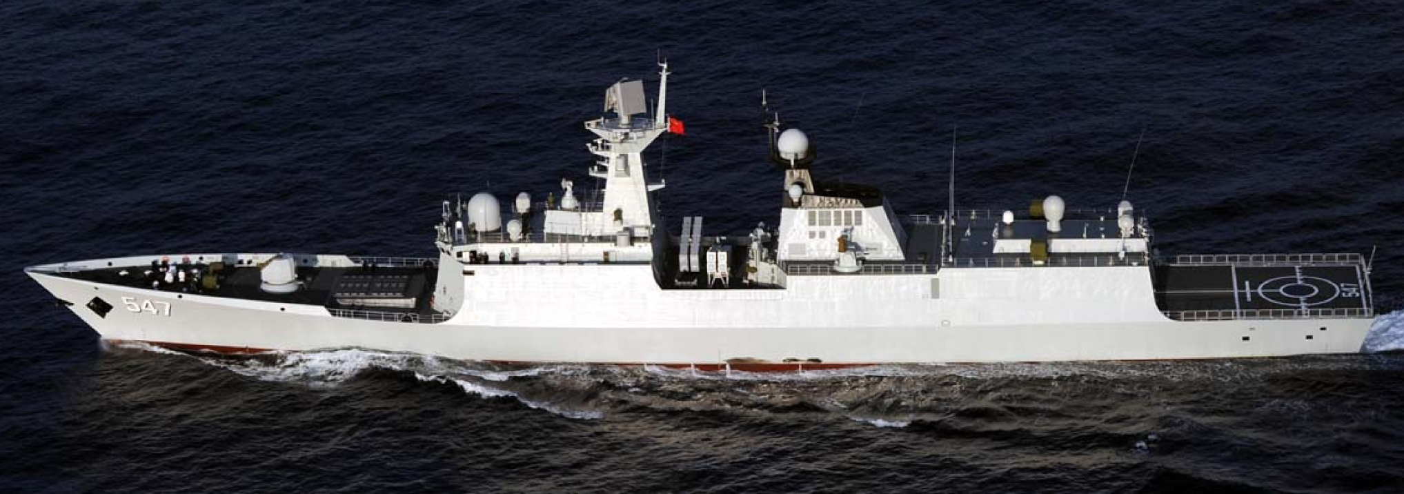 ５月２７日（月）午後１時頃、海上自衛隊第１２護衛隊「せんだい」（呉）及び第５航空群所属「Ｐ－３Ｃ」（那覇）が、宮古島の北東約１１０ｋｍの海域を東シナ海から太平洋に向けて南東進する中国海軍ルフ級駆逐艦１隻、ジャンカイⅡ級フリゲート１隻及びフーチン級補給艦１隻の合計３隻を確認しました。